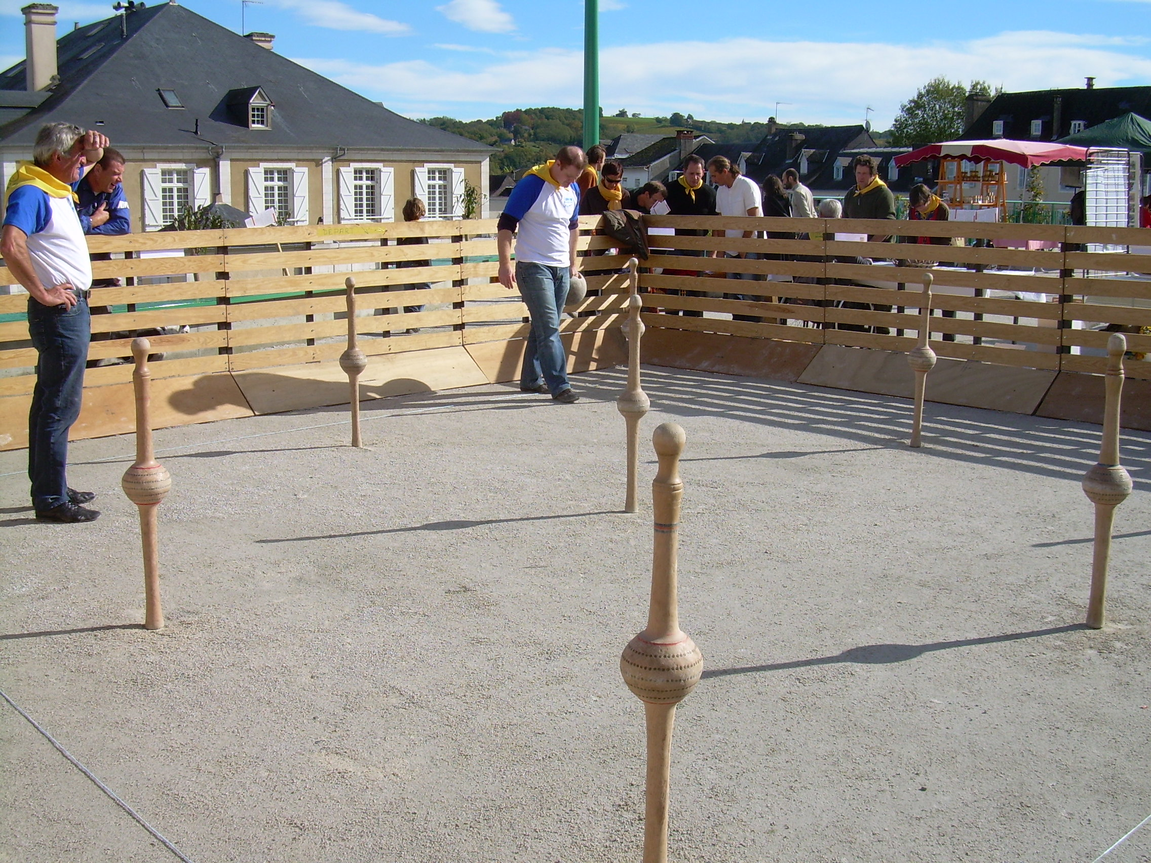 personau